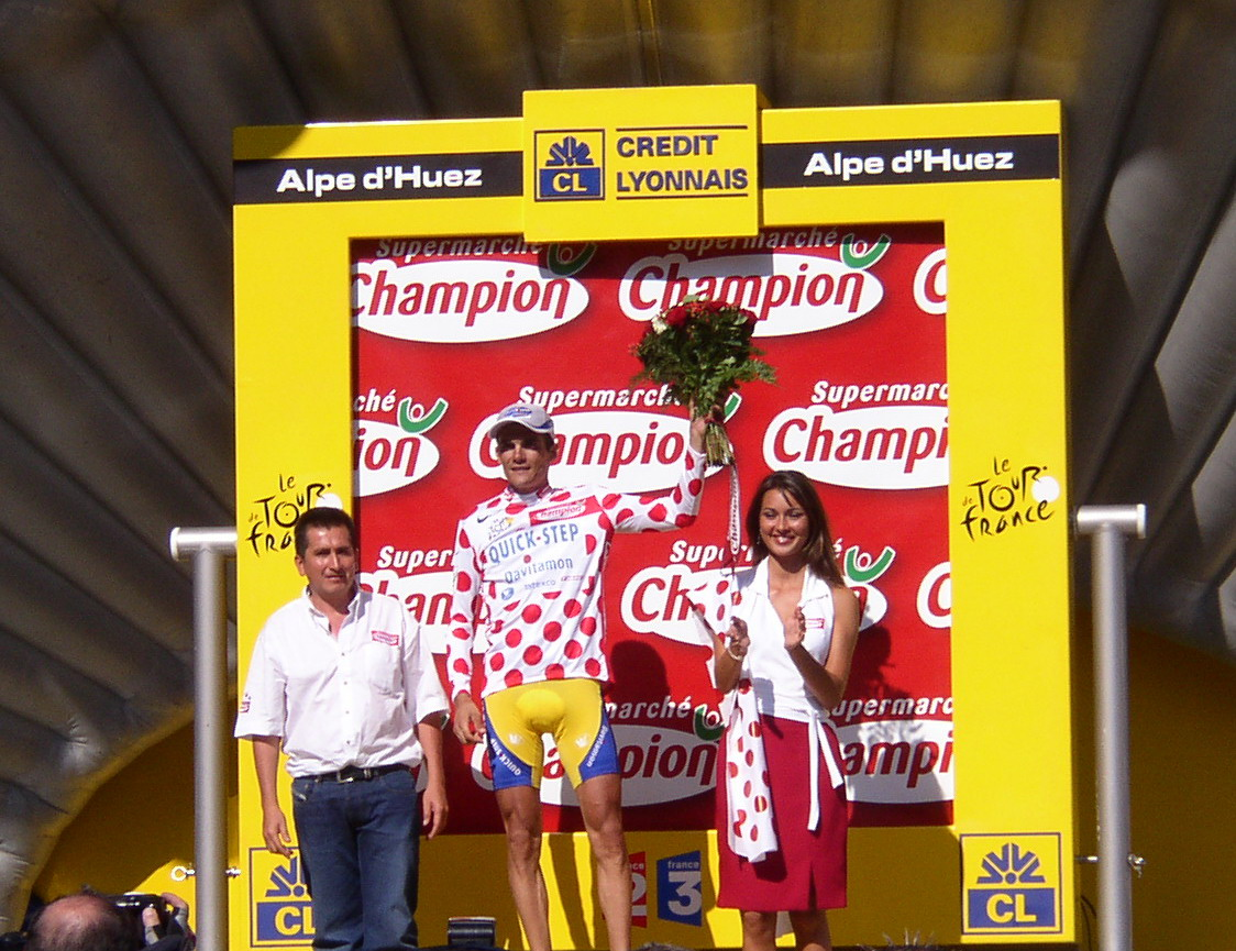 Richard Virenque, in maglia a pois di leader della classifica GPM, all'arrivo dell'8a tappa del Tour de France 2003, Sallanches - L'Alpe d'Huez.